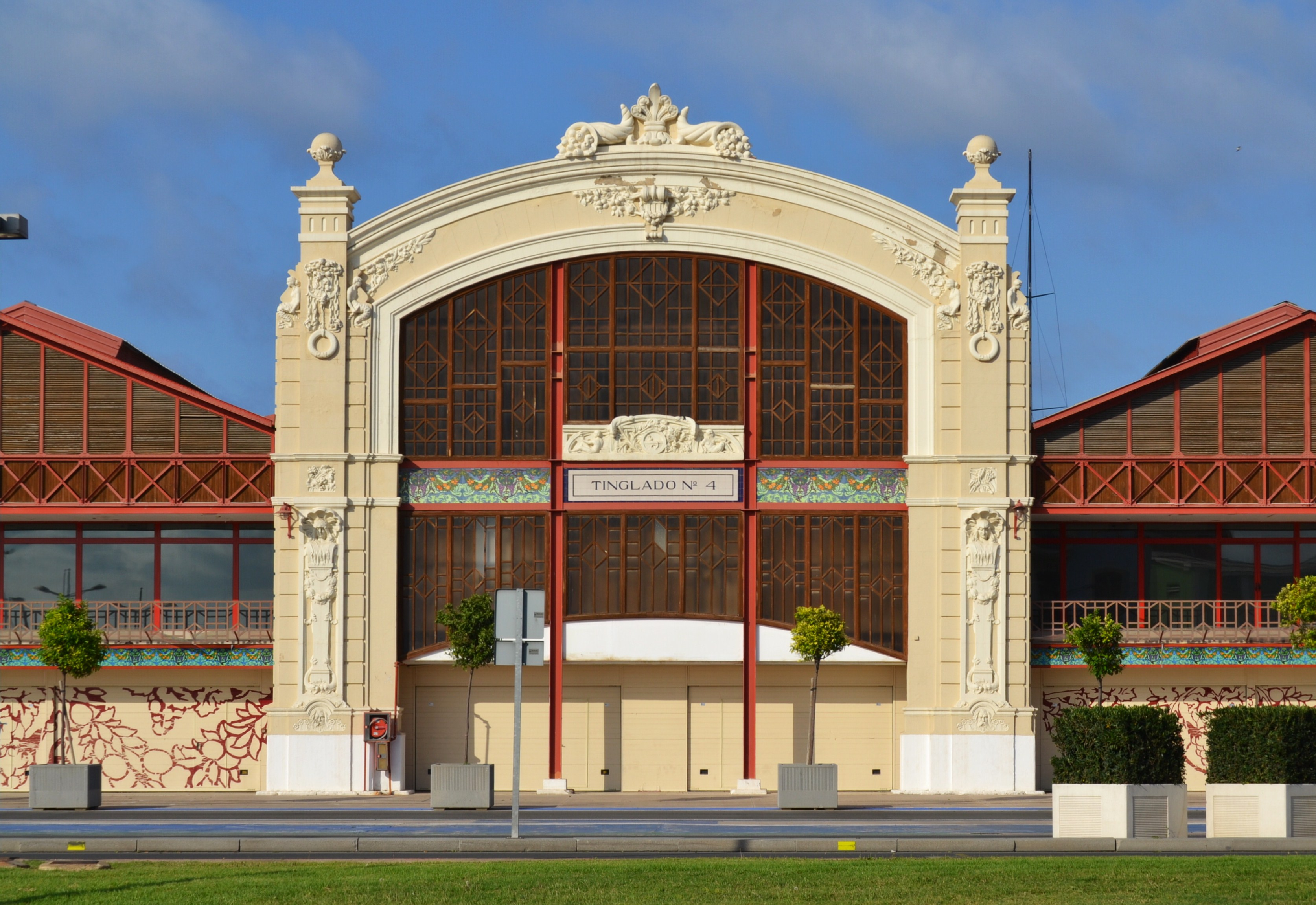 Façana del cobert n. 4 del port de València.